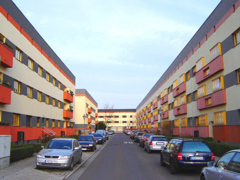 Coswiger Strasse, Magdeburg (Germany)